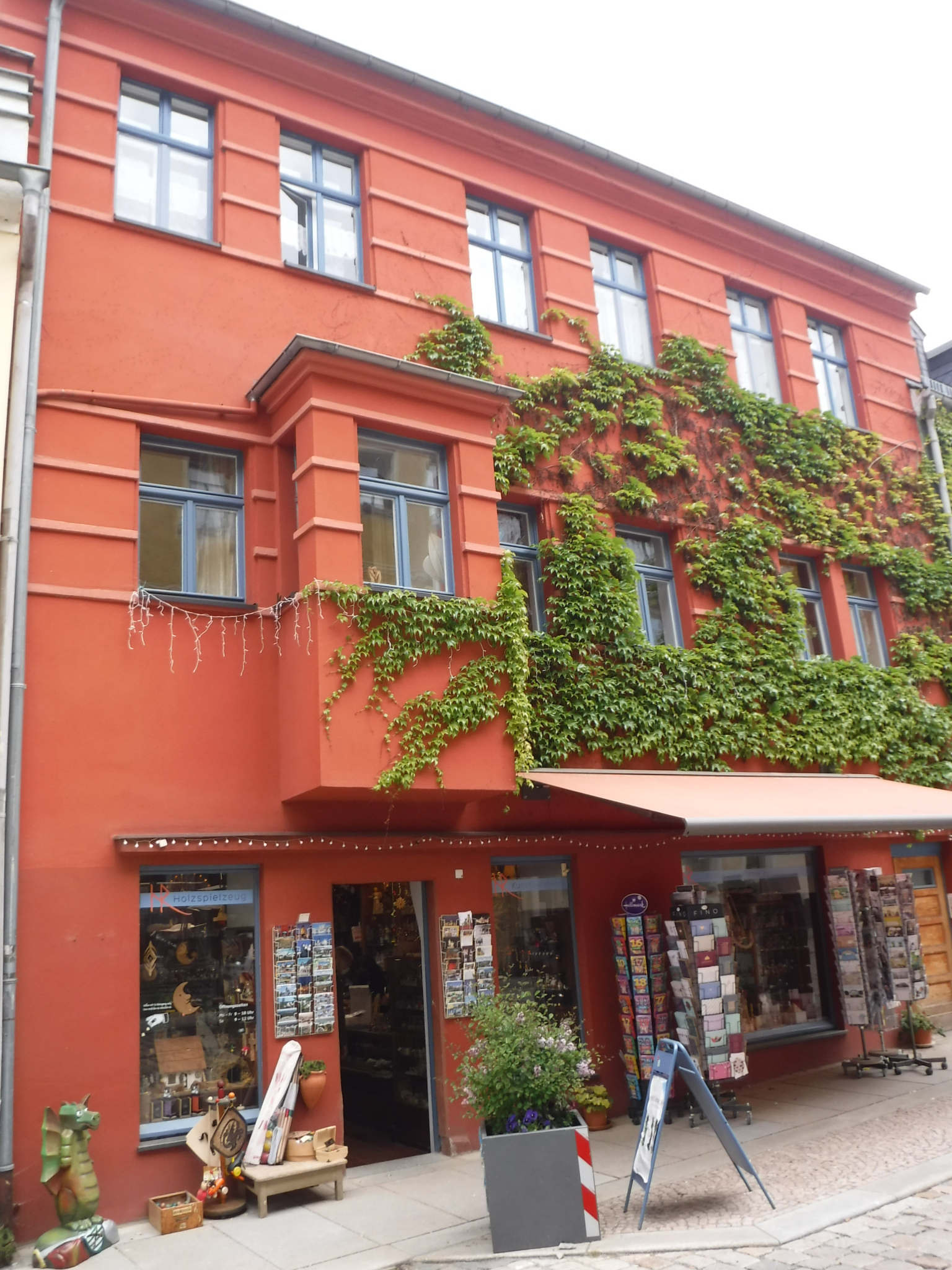 Holzbildhauer Hartmut Rademann Obere Schloßstraße 3, 08340 Schwarzenberg/Erzgebirge